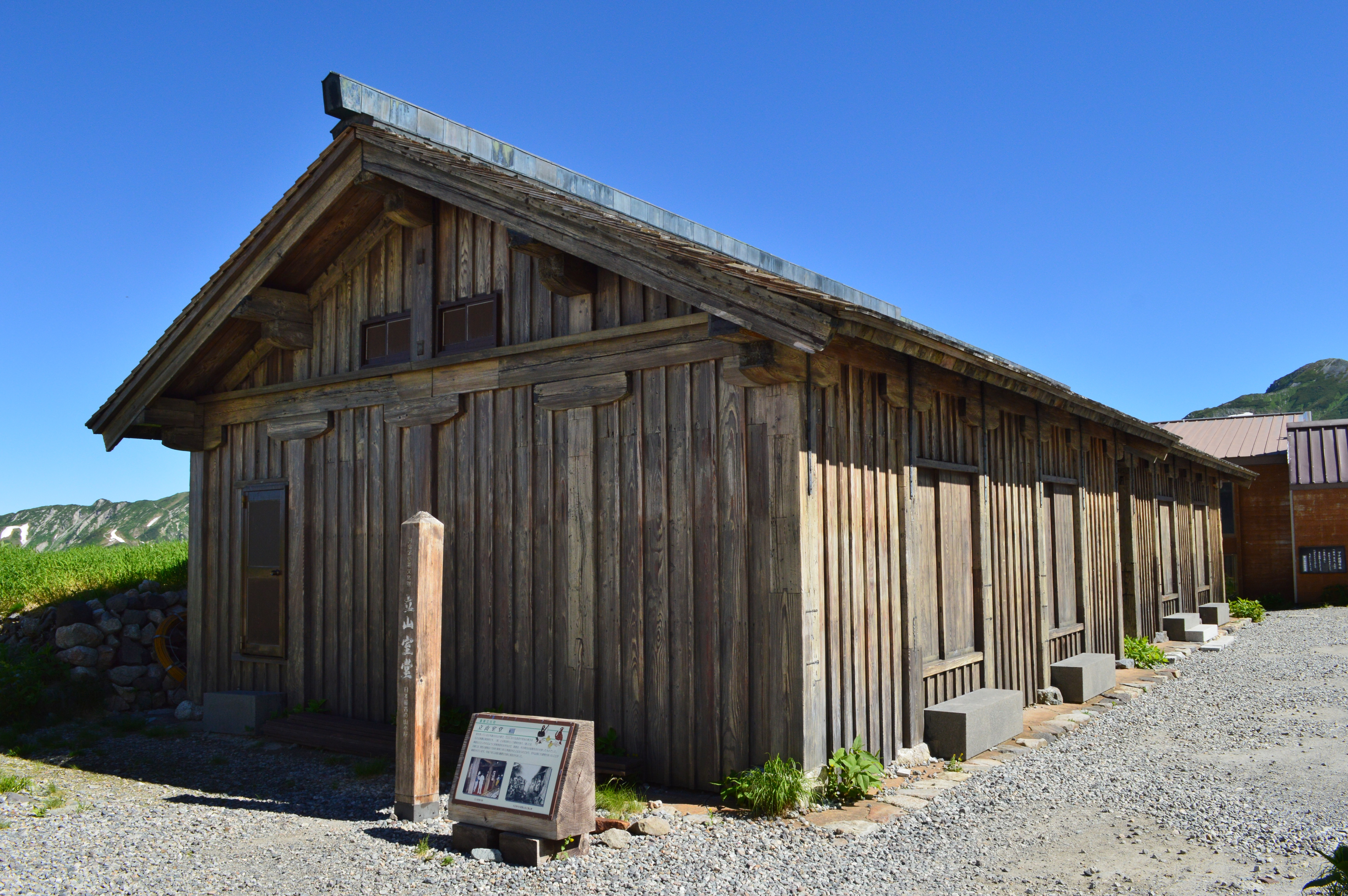 立山室堂 南棟側